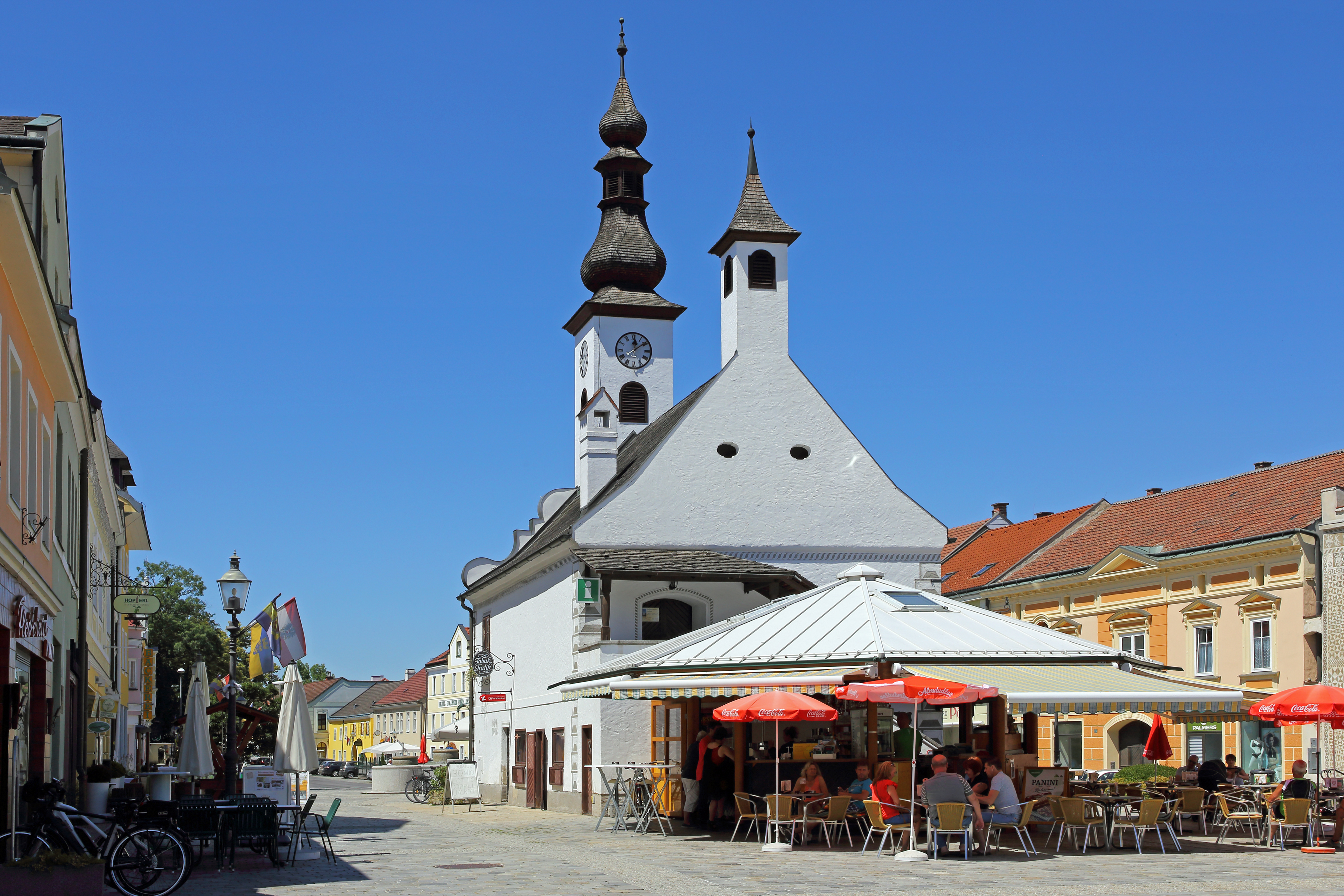 Das alte Rathaus von Gmünd wurde in der zweiten Hälfte des 16. Jahrhunderts errichtet.